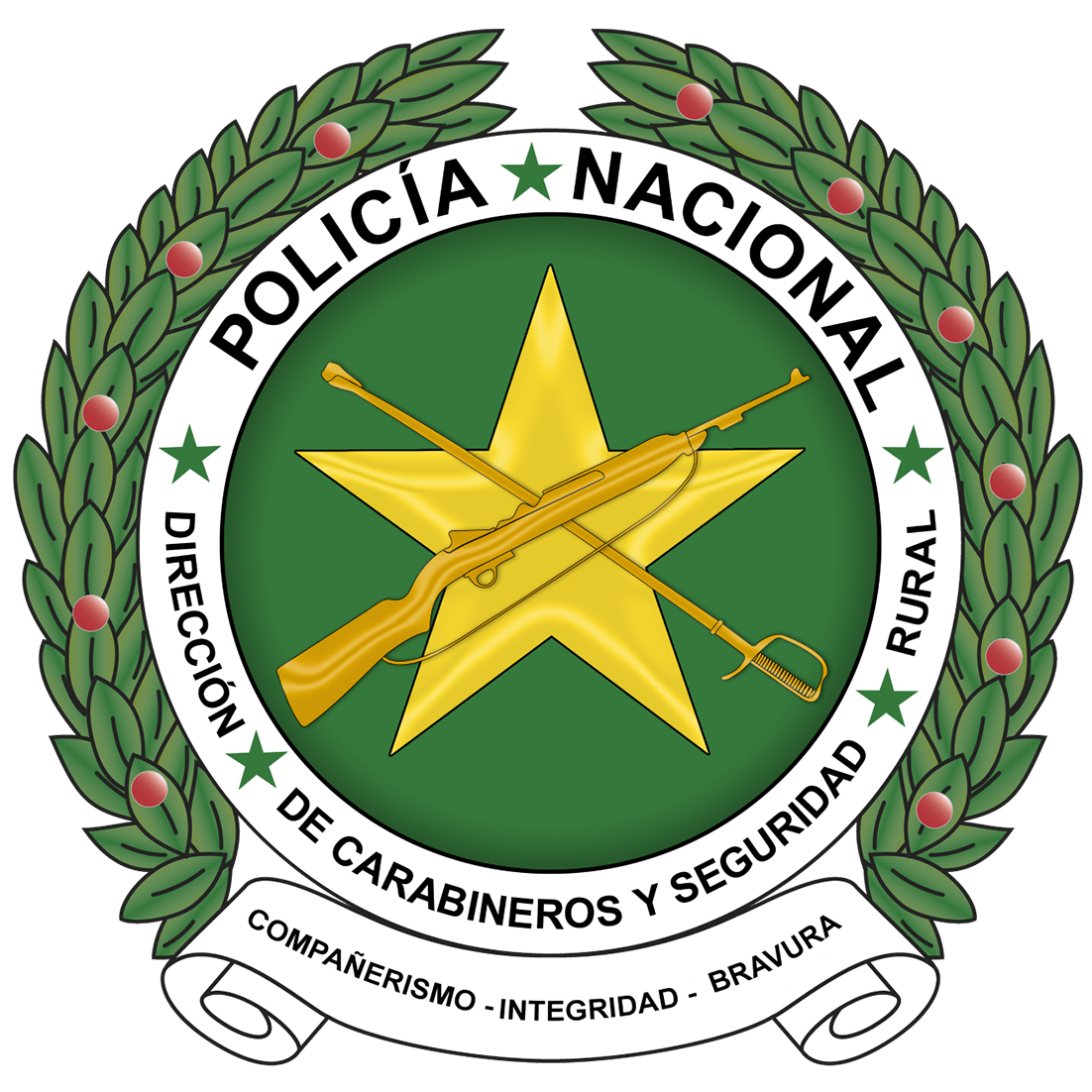 Escudo de la Dirección de Carabineros y Seguridad Rural